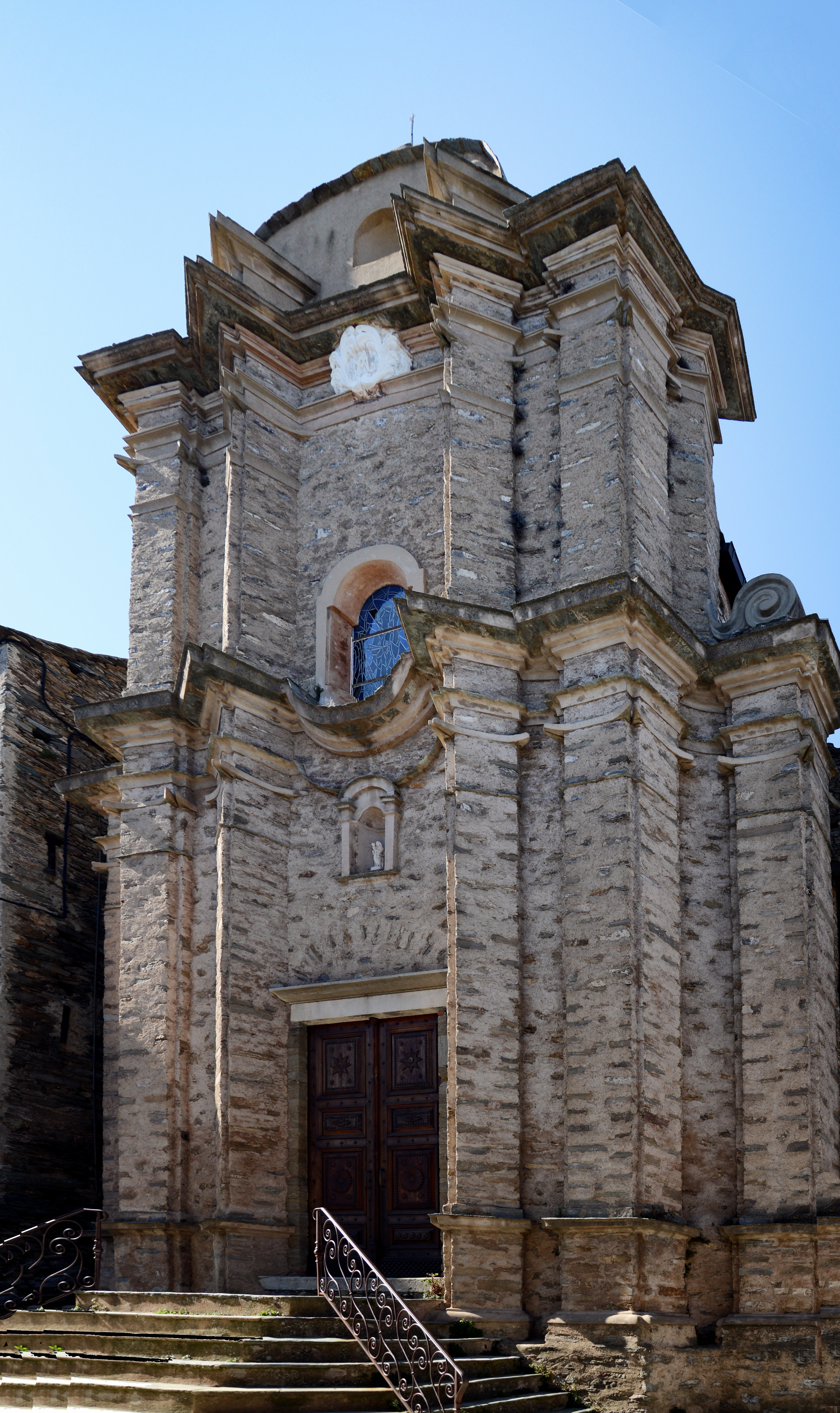 Loreto-di-Casinca (Corse) - Façade principale de l'église paroissiale Saint-André (Sant' Andria) construite en 1750 .